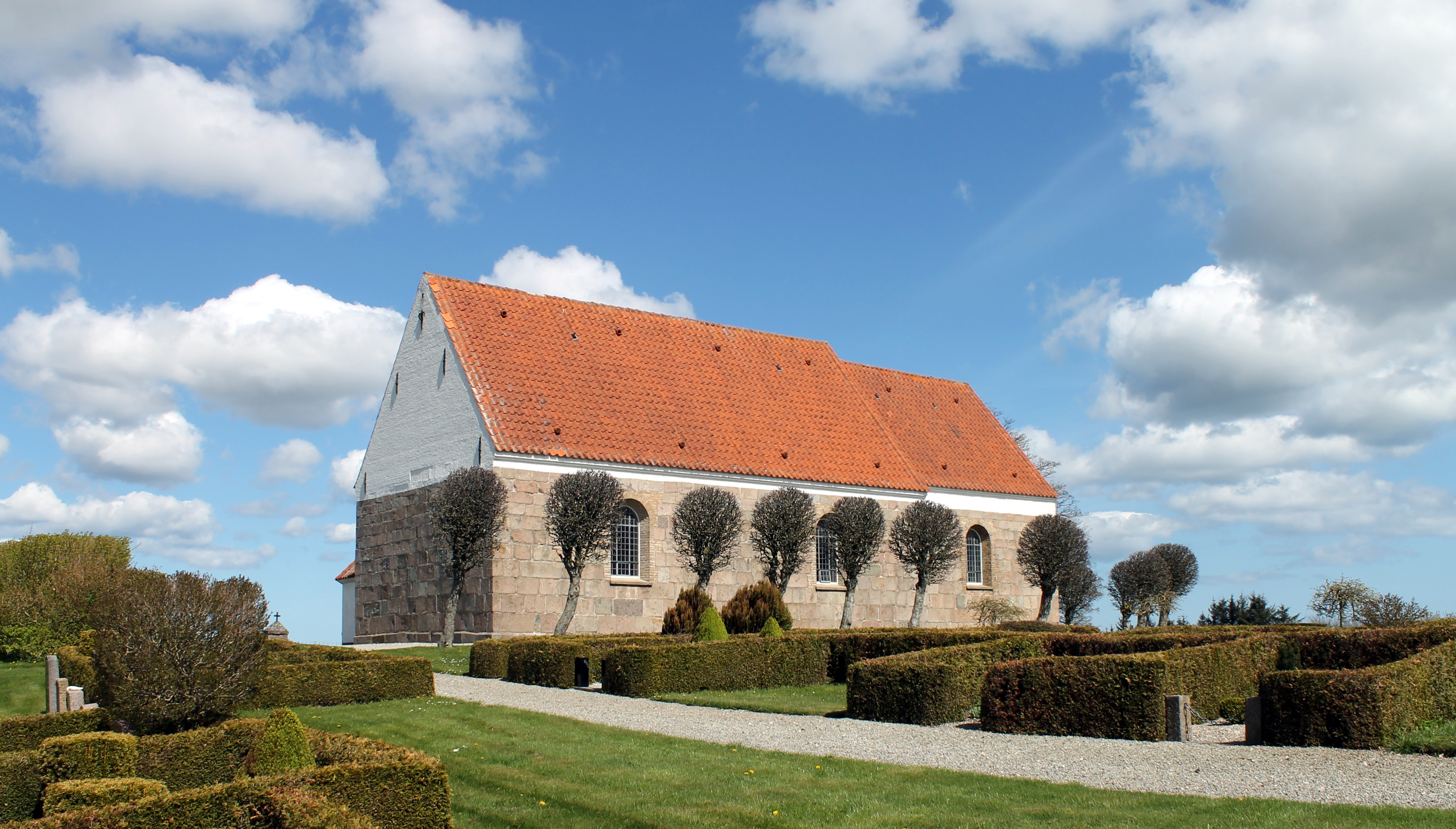 Karup Kirke, Frederiskhavn Kommune